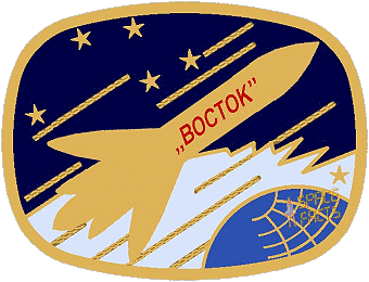 Vostok program patch